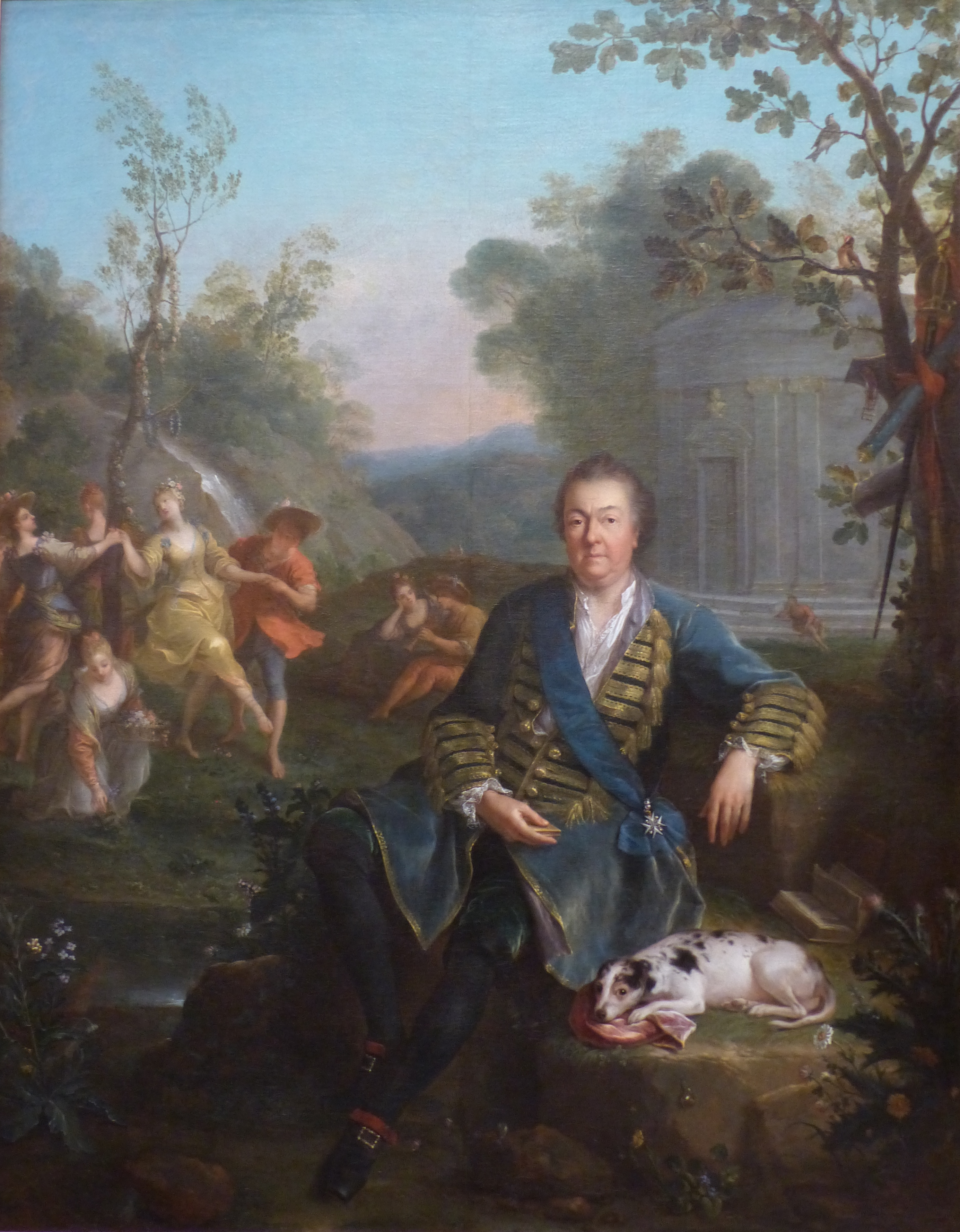 Ce portrait traduit les adieux de Philippe de Vendôme à la carrière des Armes (suspendues à l'arbre derrière lui) et aux plaisirs (symbolisés par les danseuses) et son refuge dans l'étude et la méditation (livre ouvert à sa gauche, au-dessus du chien).